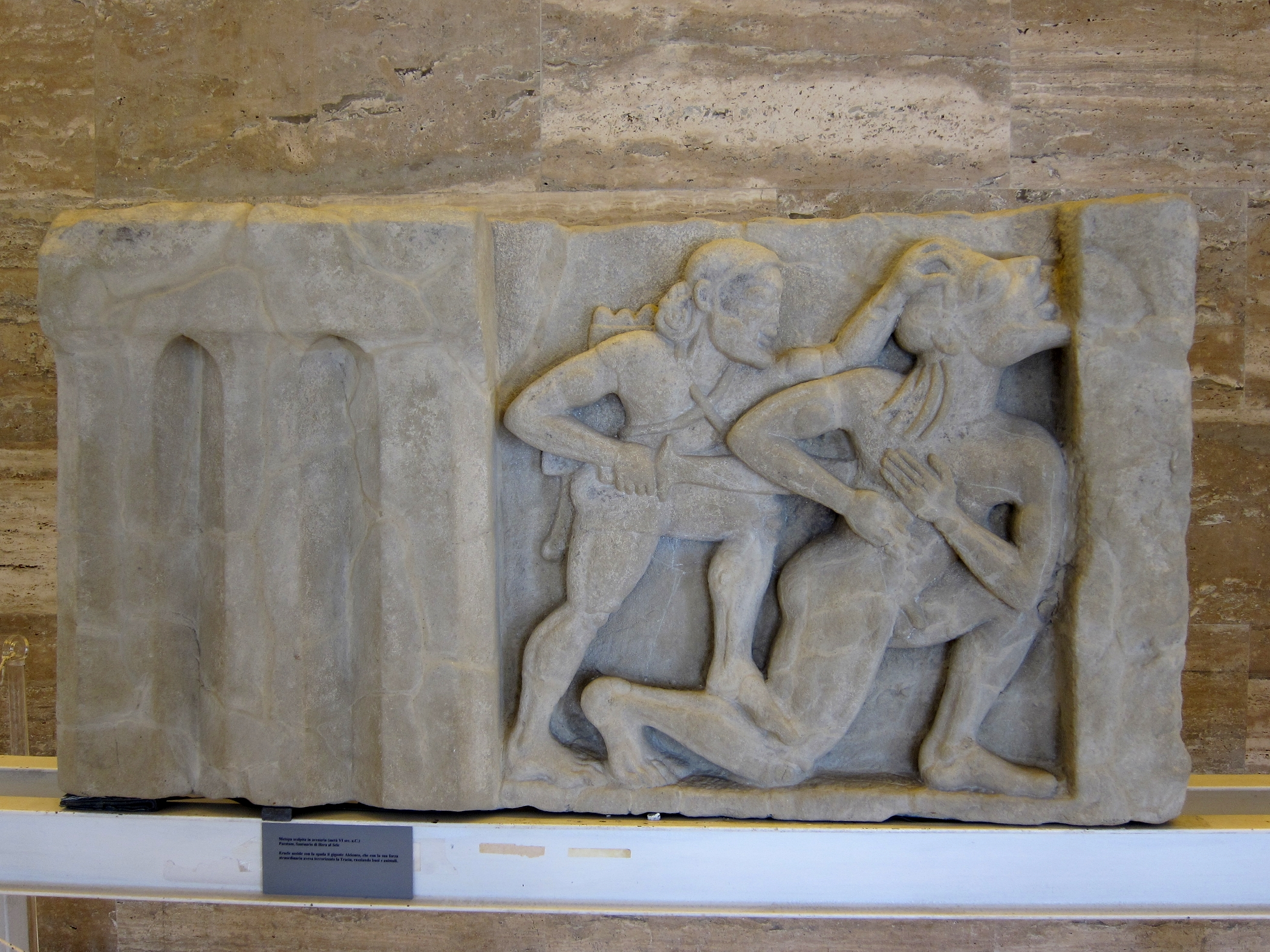 Métope du thesauros représentant Héraclès tuant Alcyonée au Museo archeologico nazionale de Paestum (Italie).